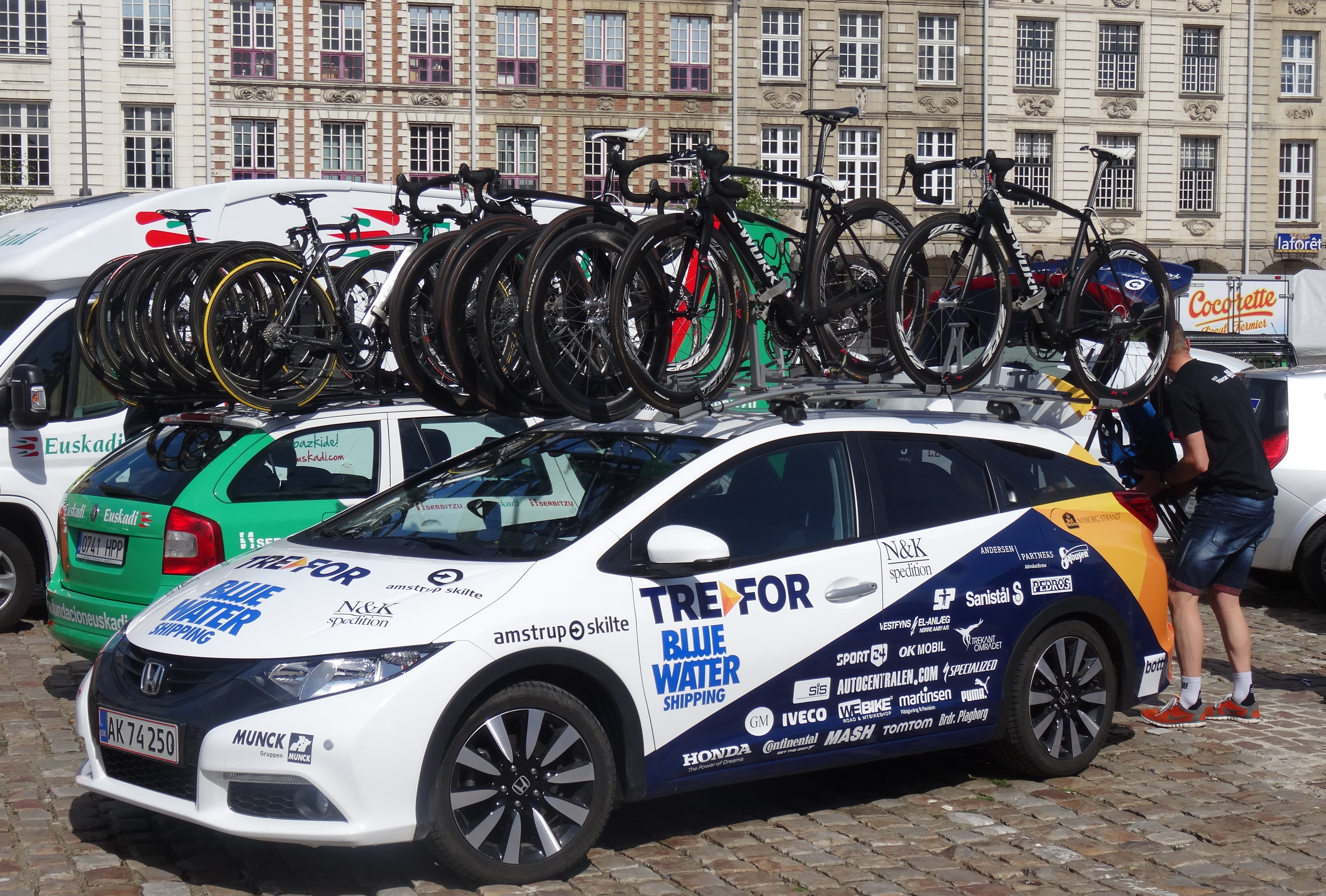 Reportage photographique réalisé le dimanche 25 mai 2014 à l'occasion du départ et de l'arrivée de la troisième étape du Paris-Arras Tour 2014 à Arras, Pas-de-Calais, Nord-Pas-de-Calais, France. Depicted team: Trefor-Blue Water